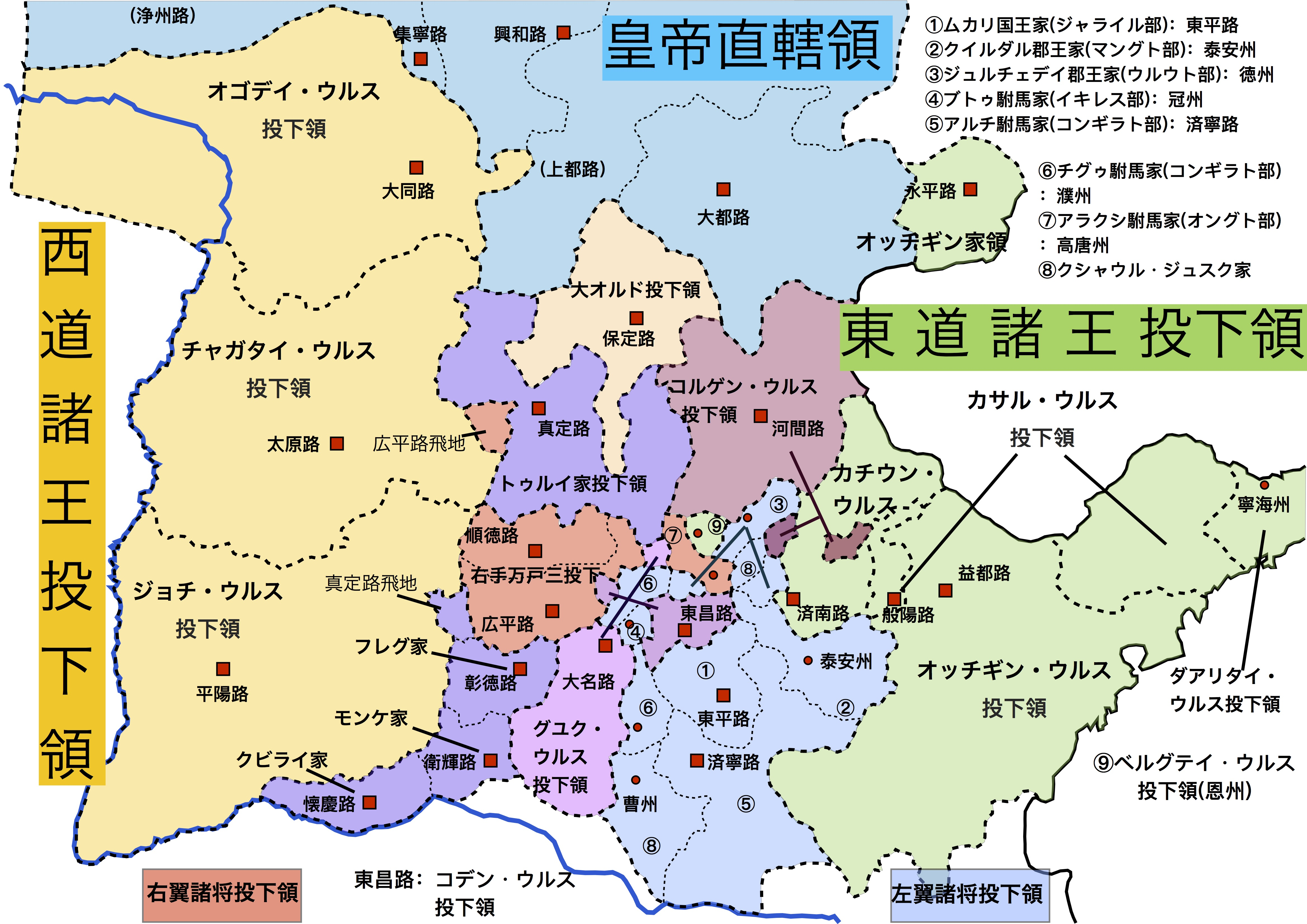 モンゴル帝国時代に諸王・勲臣に与えられた華北の投下領を示した図。